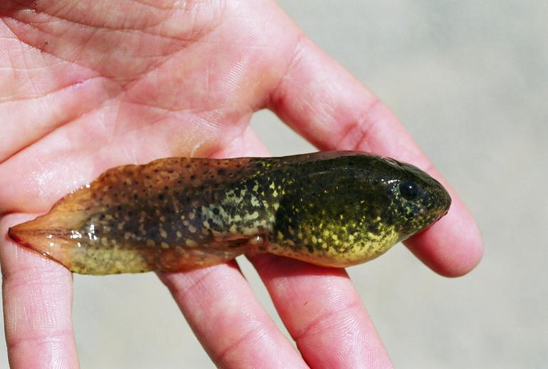 Rana catesbeiana